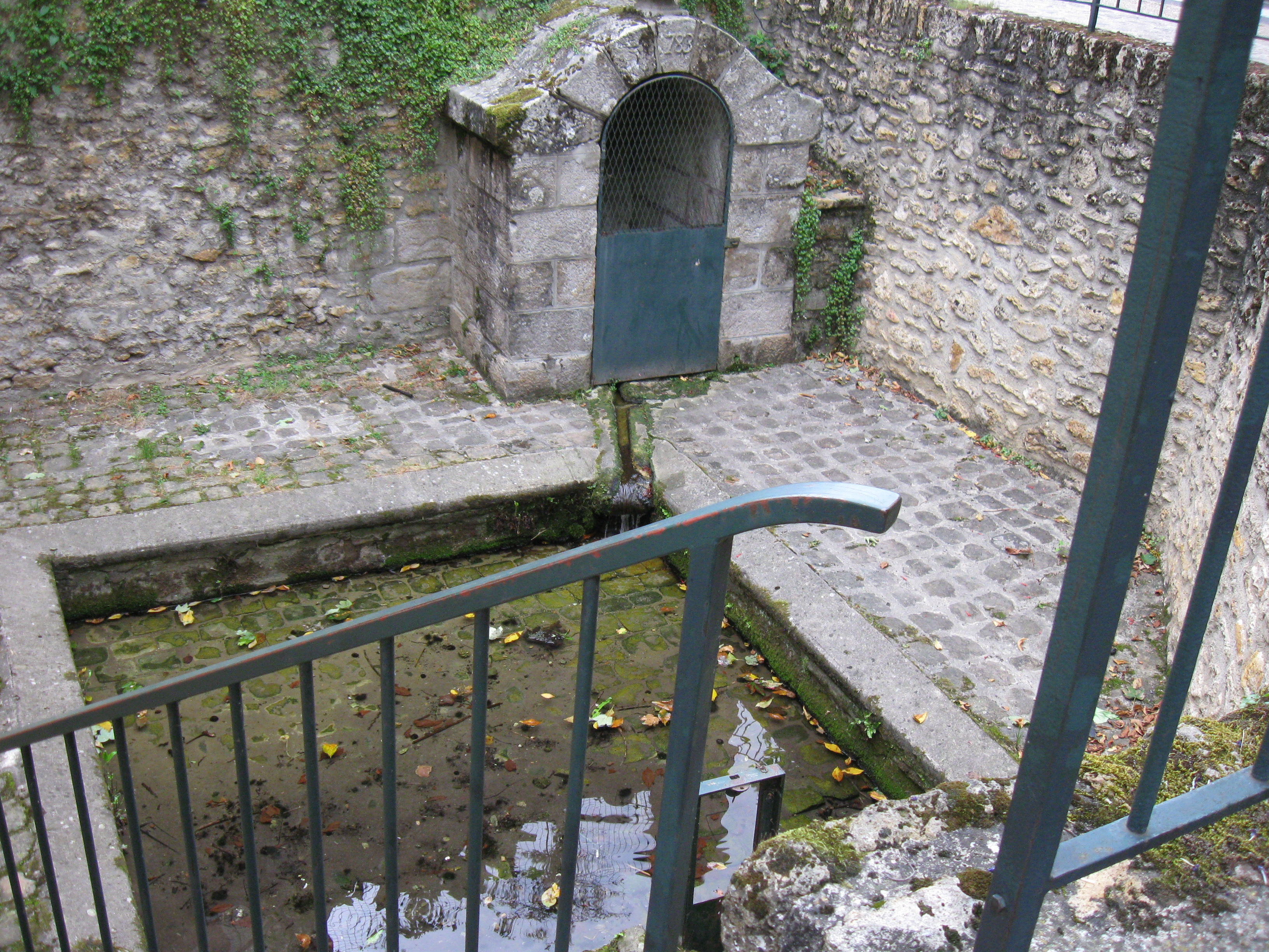 Le lavoir des remparts alimenté par une source servit à rincer le linge précédemment lavé dans la rivière. (Tournan-en-Brie, département de la Seine et Marne, région Île-de-France).